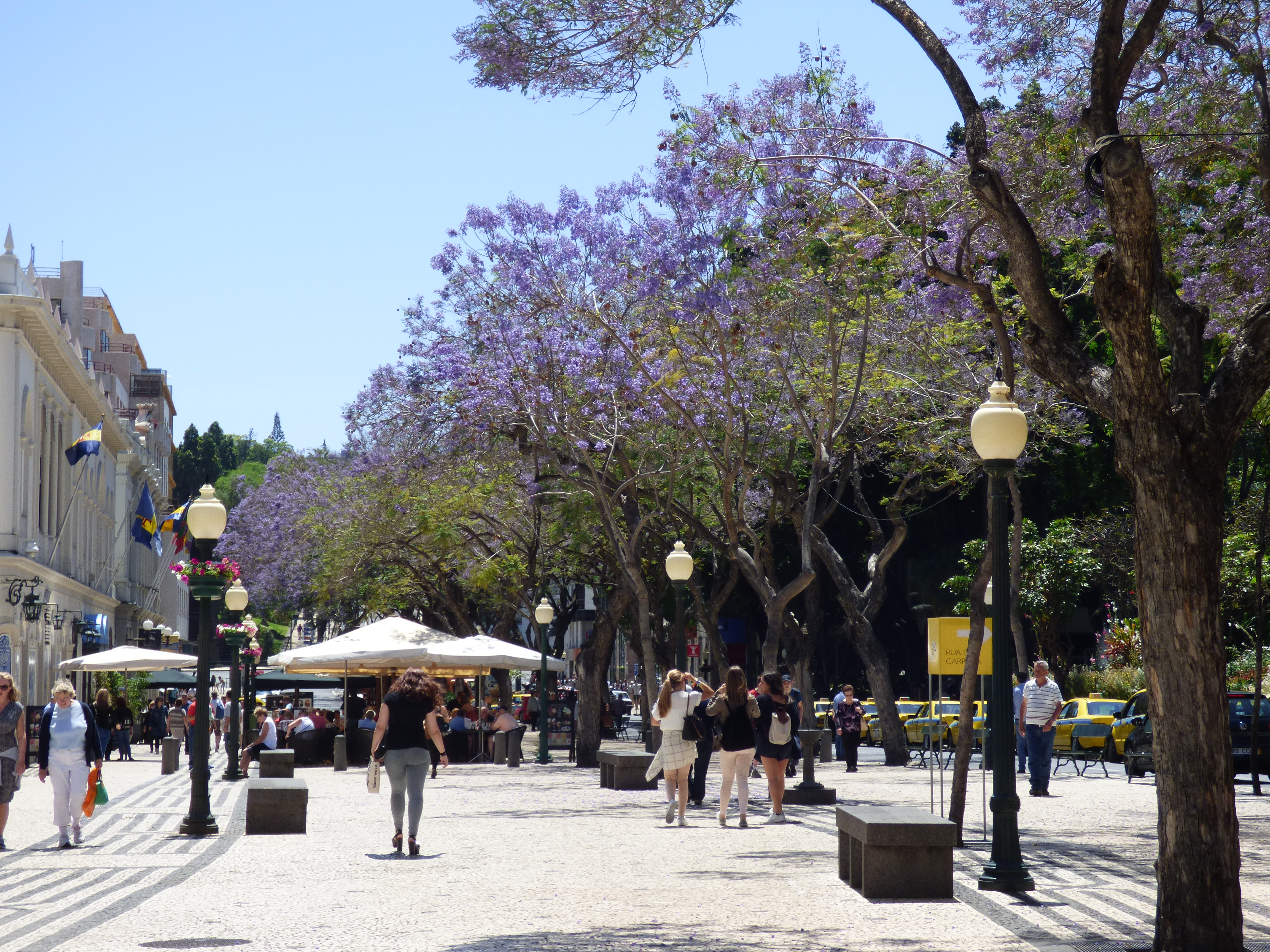 Funchal 12